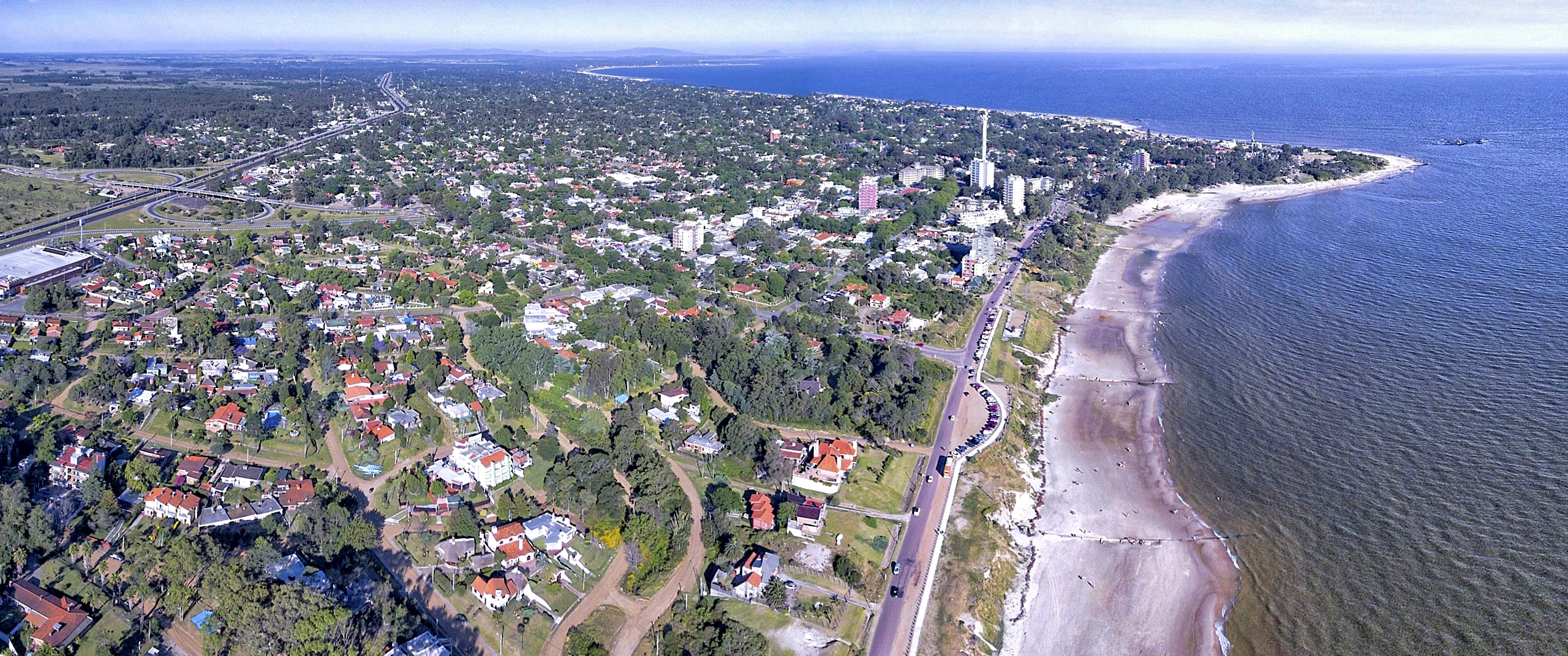 Panoramic Atlántida